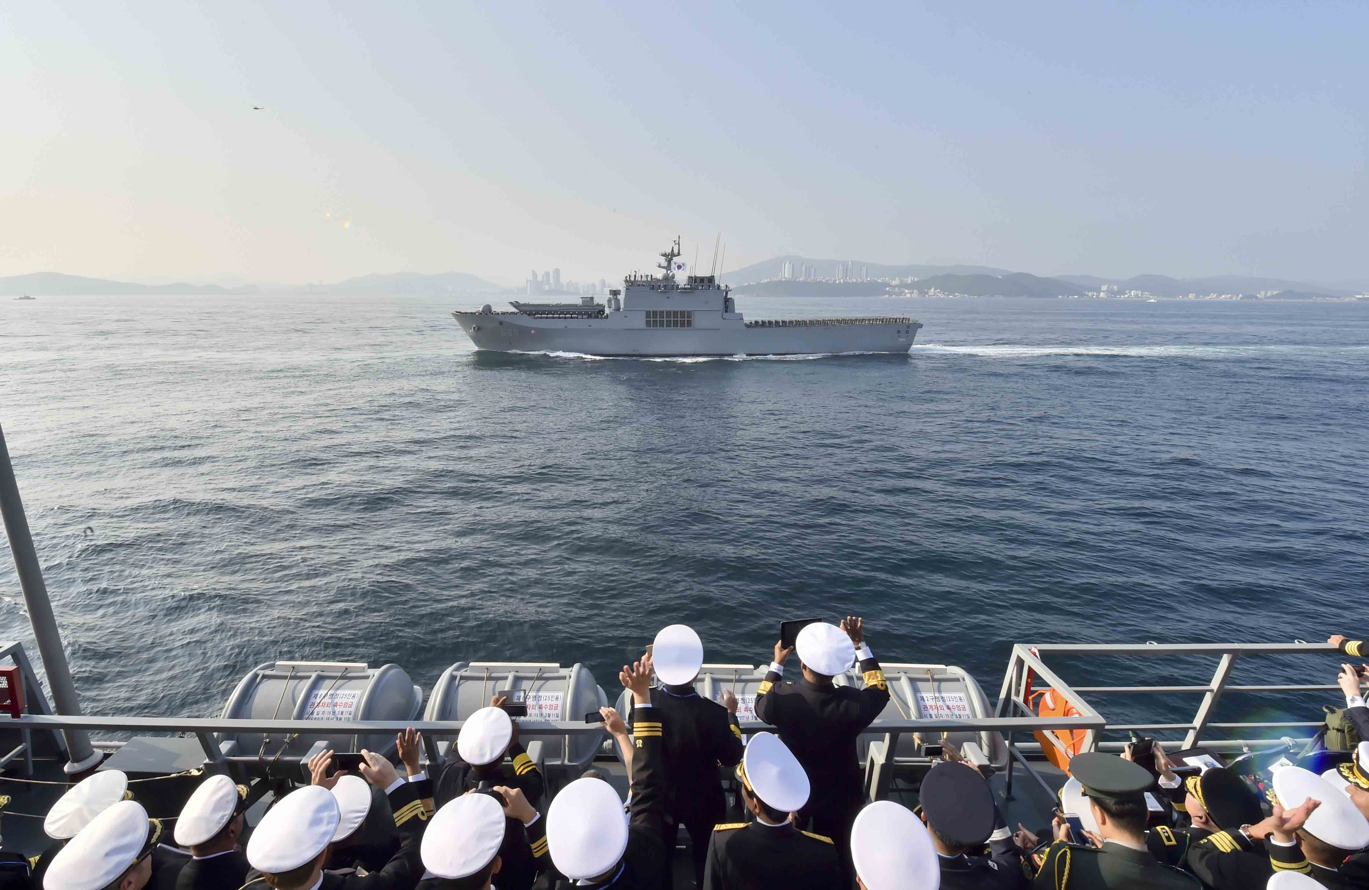 20151023 관함식 해상사열NPC_0663